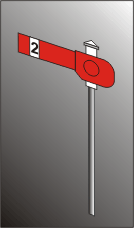 Segnali Ferroviari